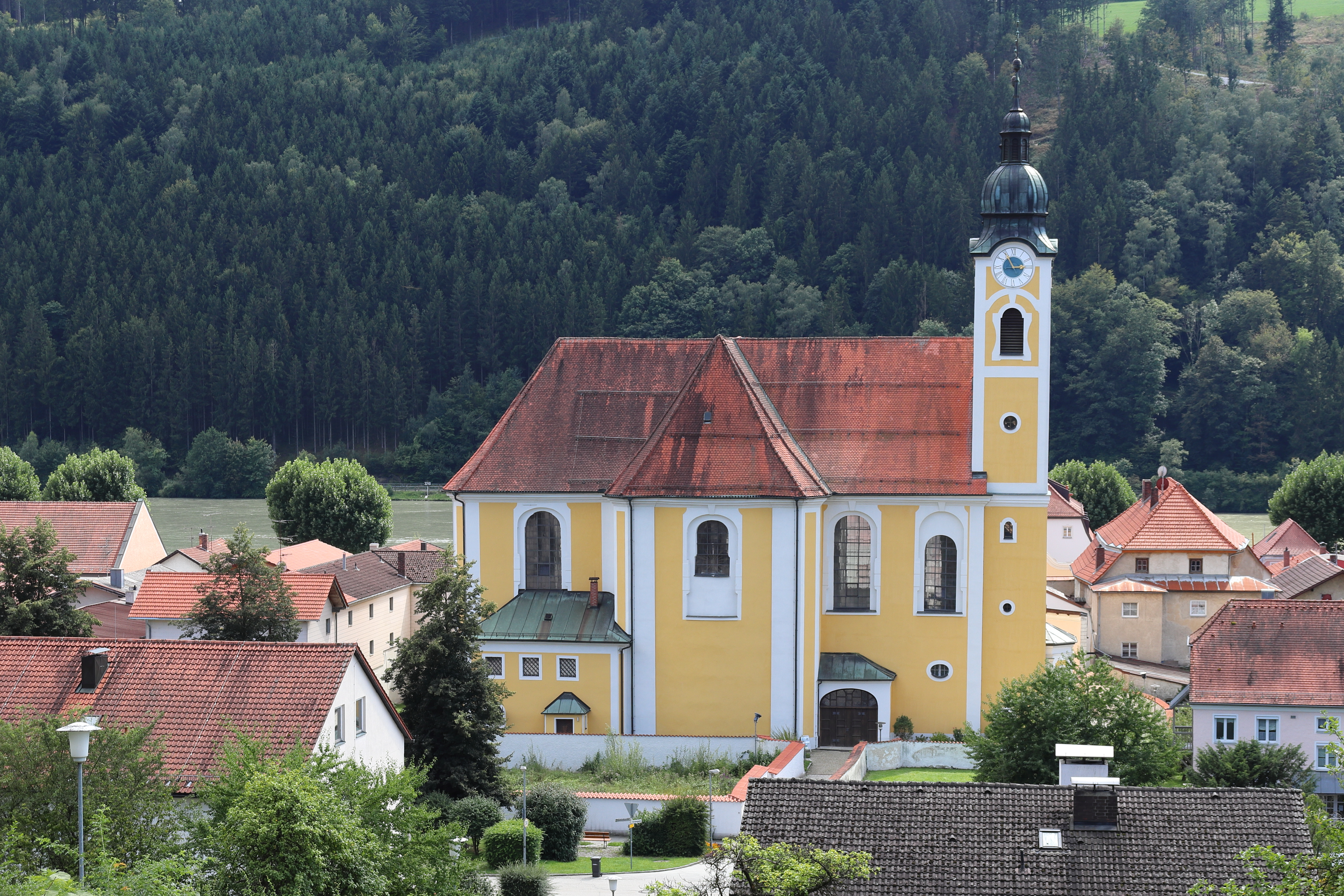 Nordseite der Pfarrkirche Mariä Himmelfahrt in Obernzell